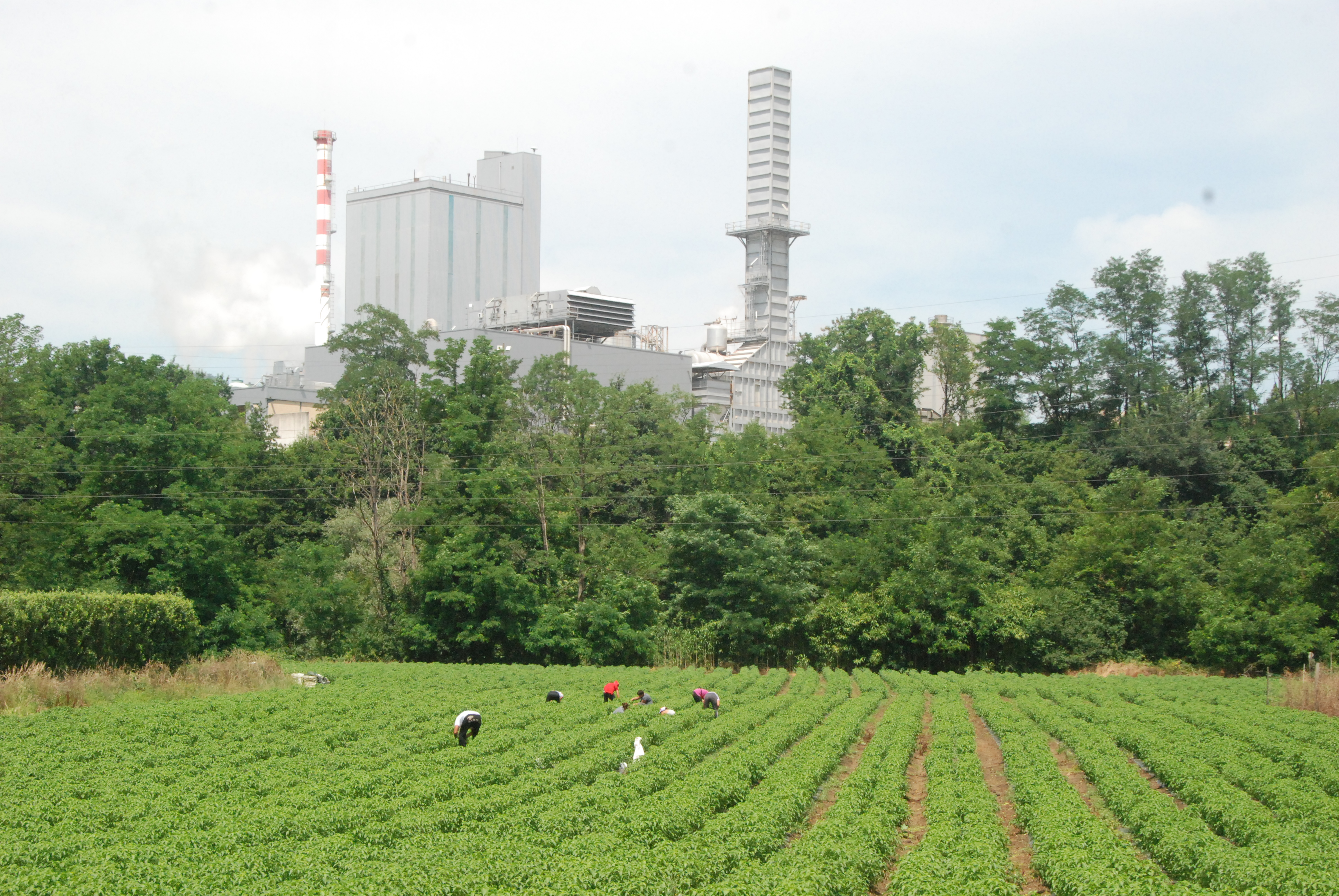 Zikuñagako paper-fabrika